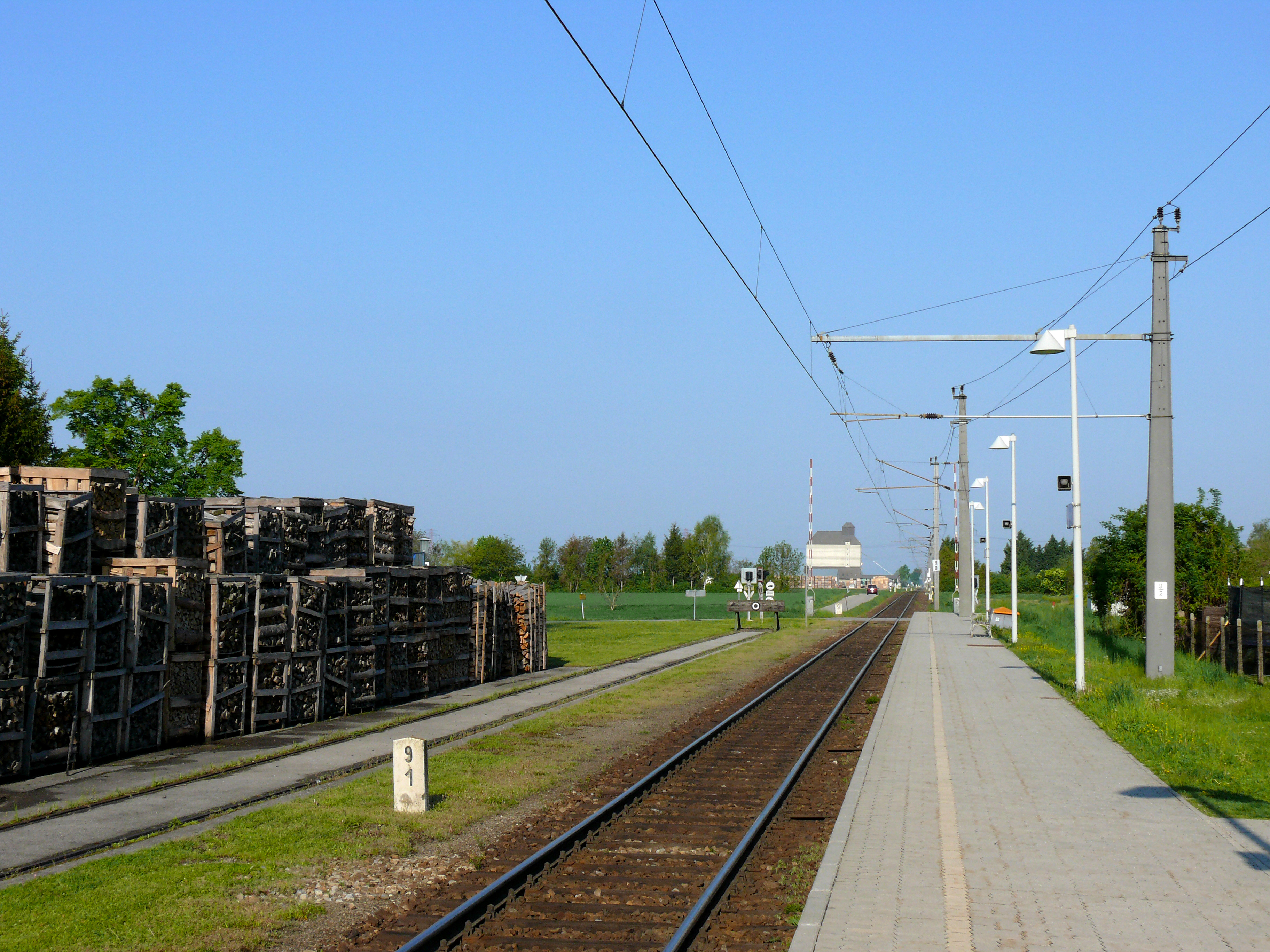 Ehemaliger Hausbahnsteig am Bahnhof Hausleiten.